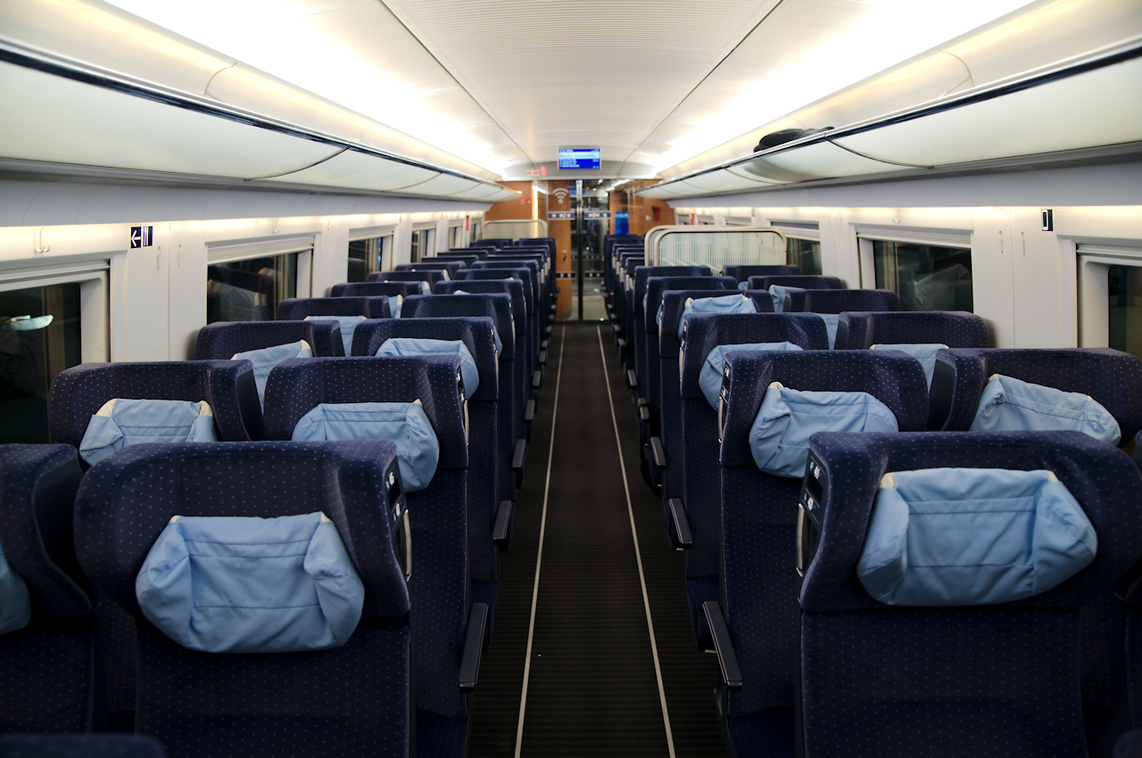 Innenraum 2. Klasse Wagen nach dem durchgeführten Redesign 2018/2019